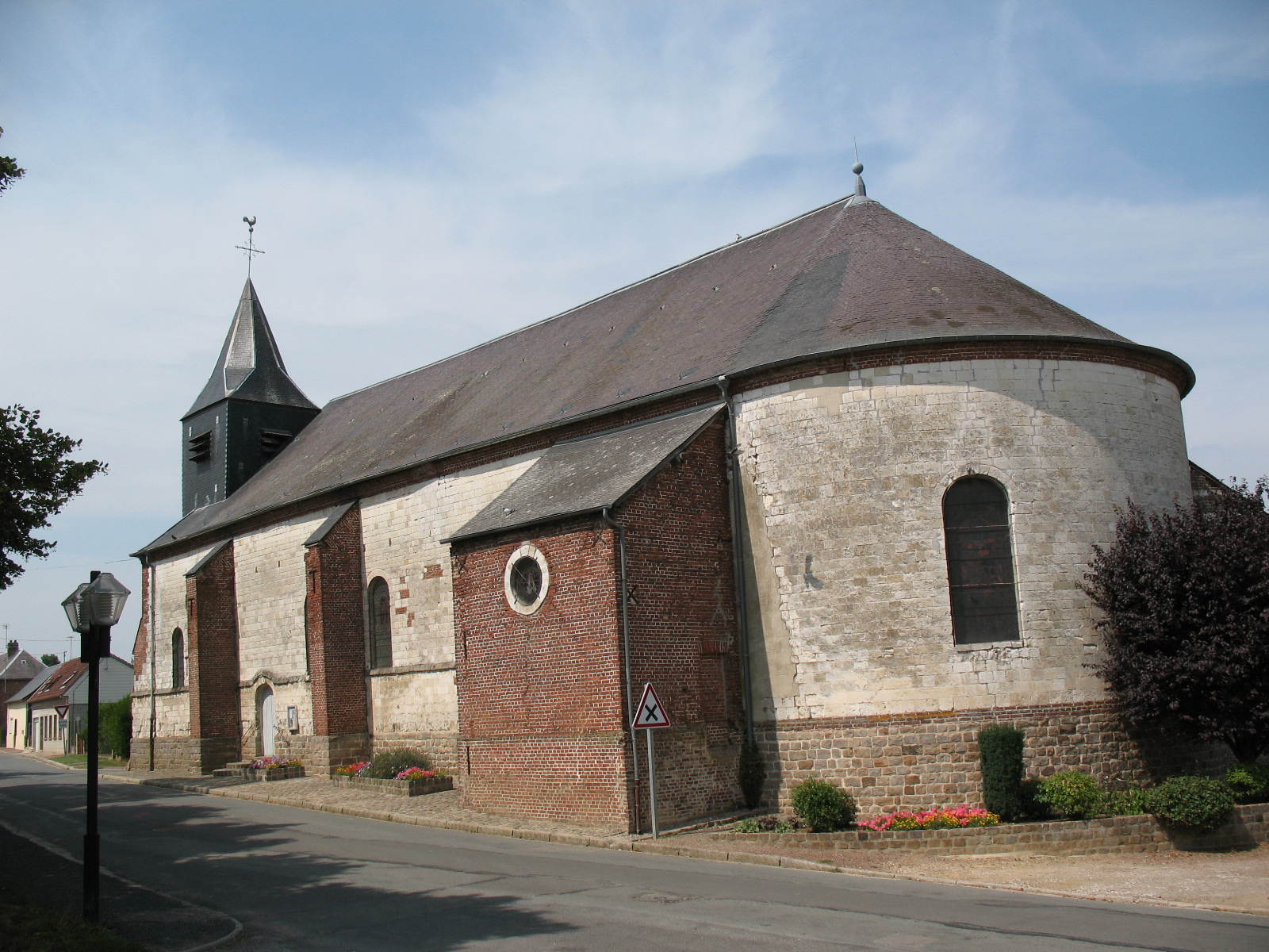 L'église construite en 1656 a été remaniée à plusieurs reprises. Les travaux de 1828 lui ont donné sa forme actuelle de croix latine avec abside arrondie.